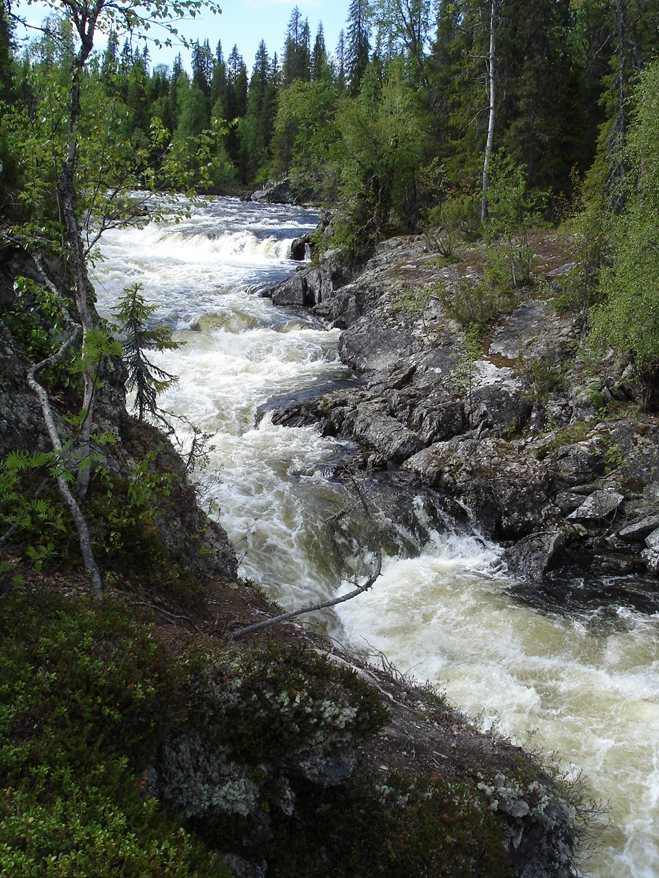 Каньон Короткий на р. Красненькой